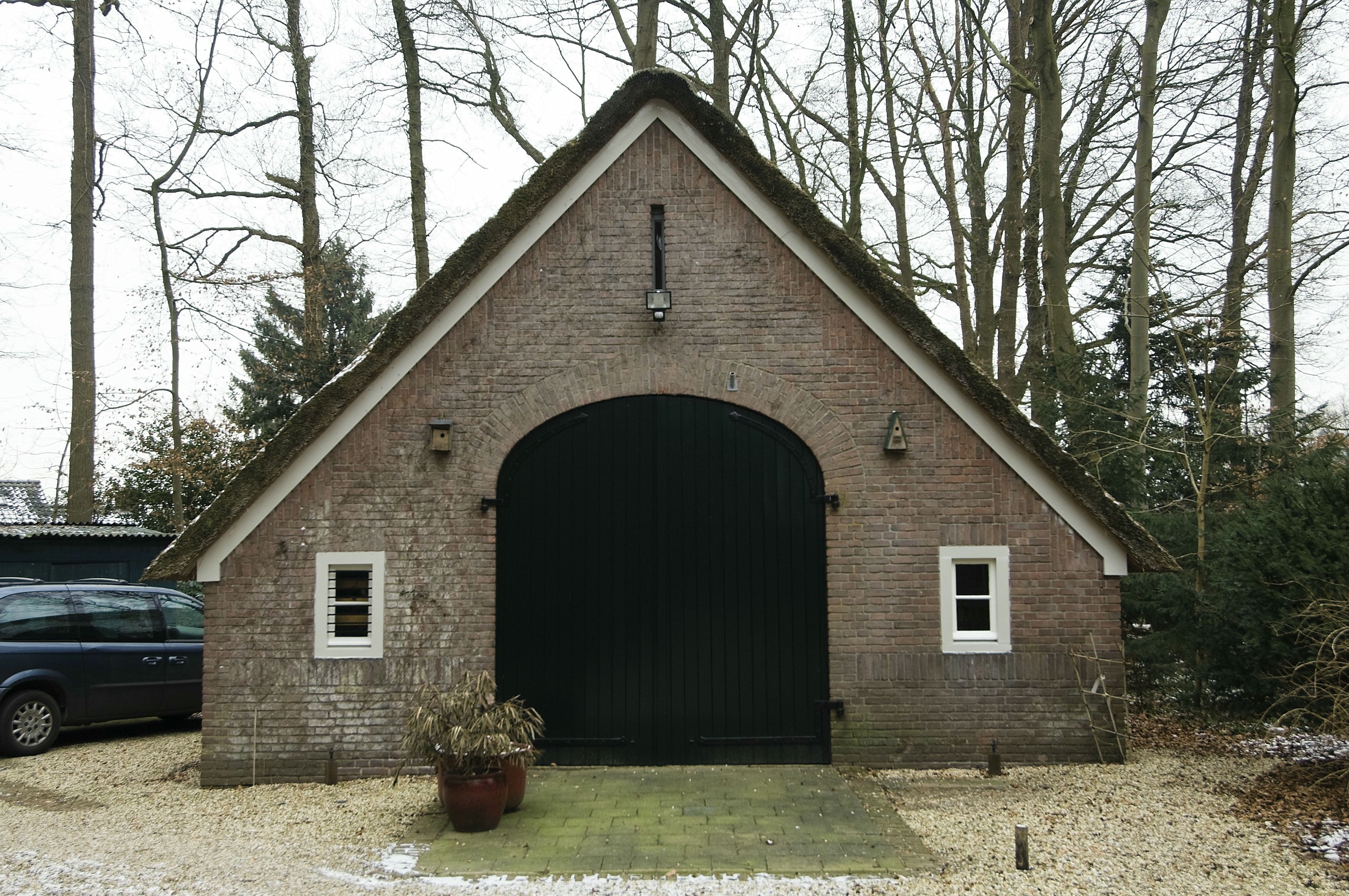 Overdok: Zicht op stenen garage, voorijde met dubbele deuren